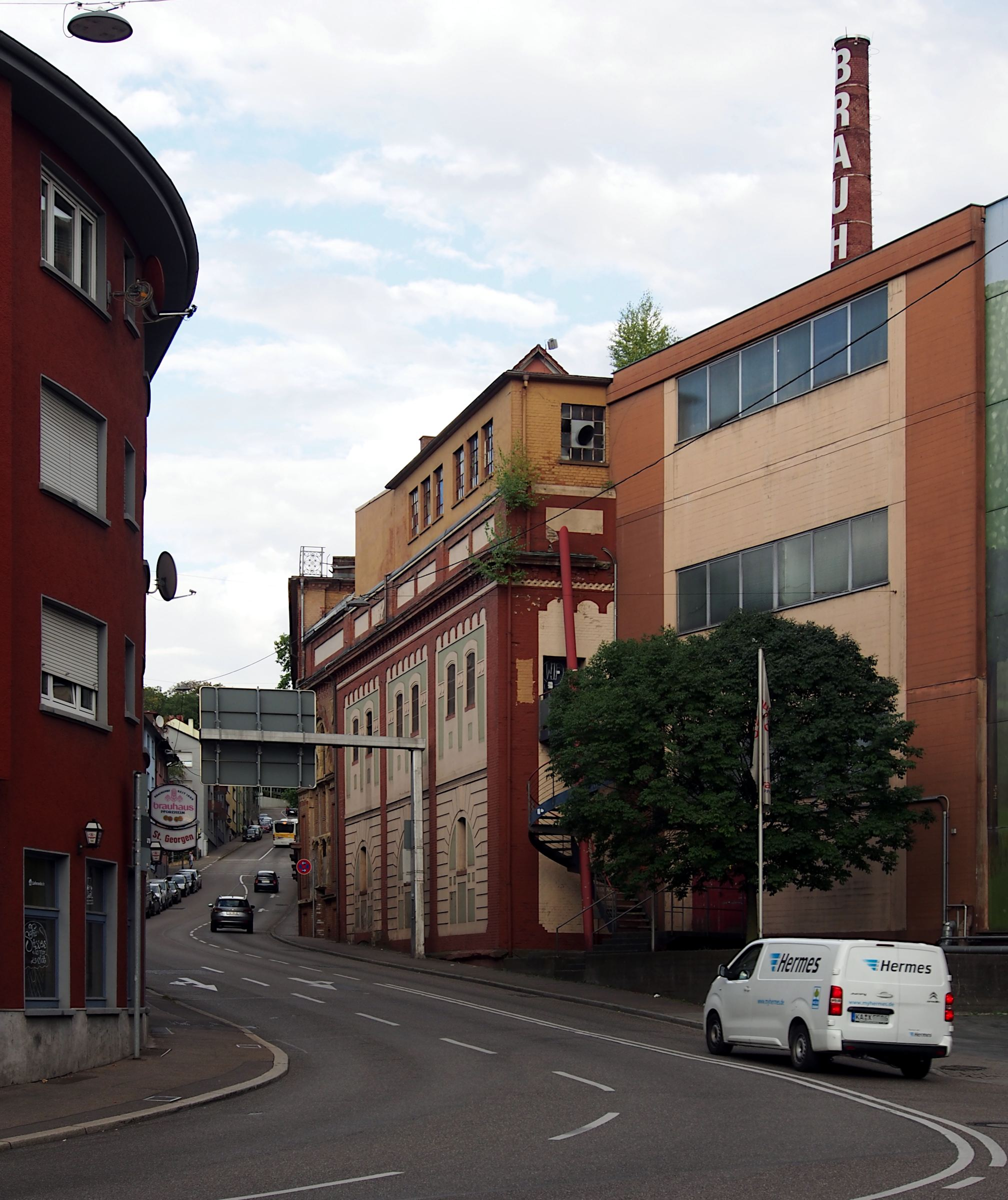 St.Georgen-Steige in Pforzheim. Rechts Brauhaus Pforzheim, links Gaststätte St. Georgen. Auffahrt zum Buckenberg.